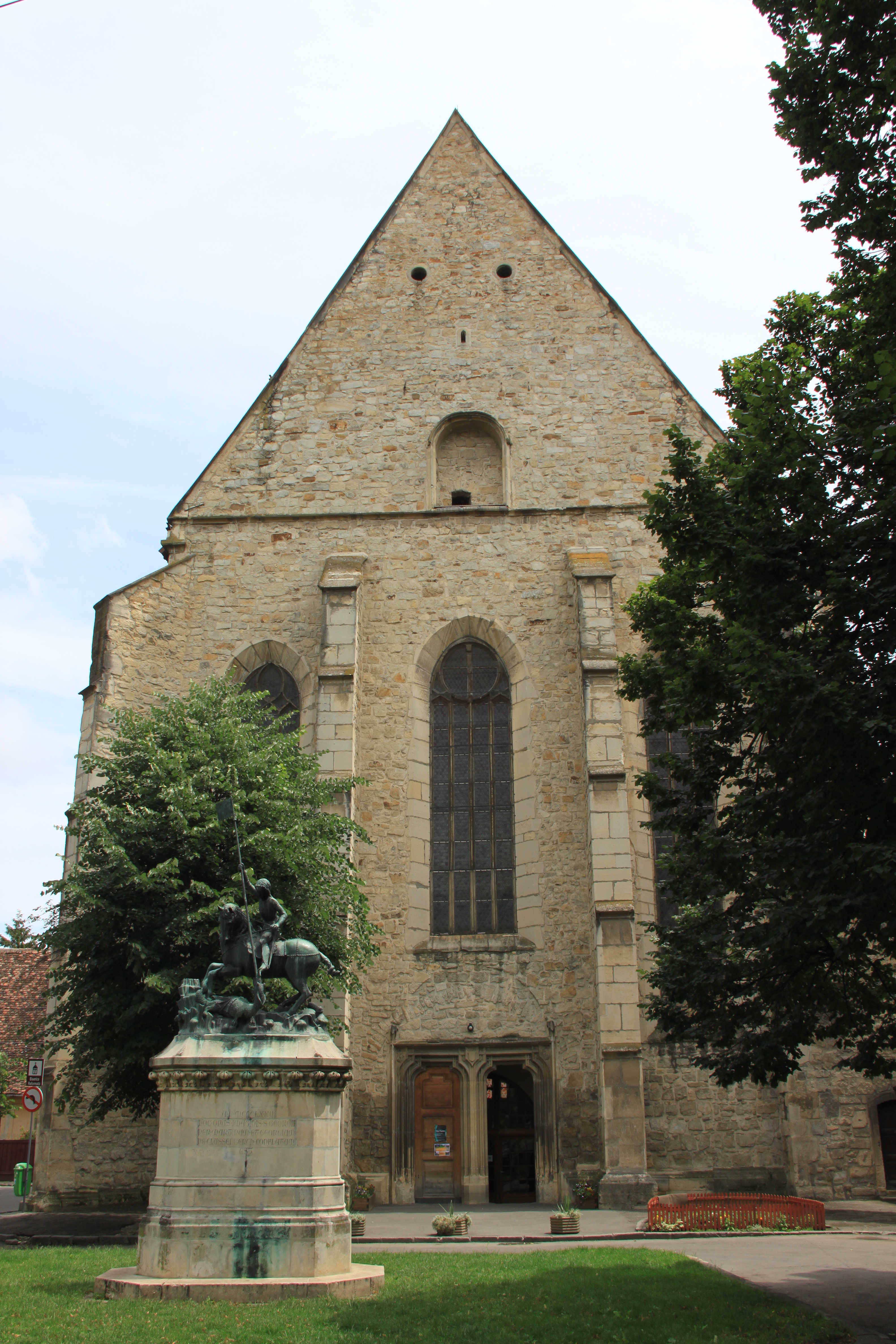 Cluj-Napoca, Biserica Reformată-Calvină (str. M.Kogălniceanu nr.21)